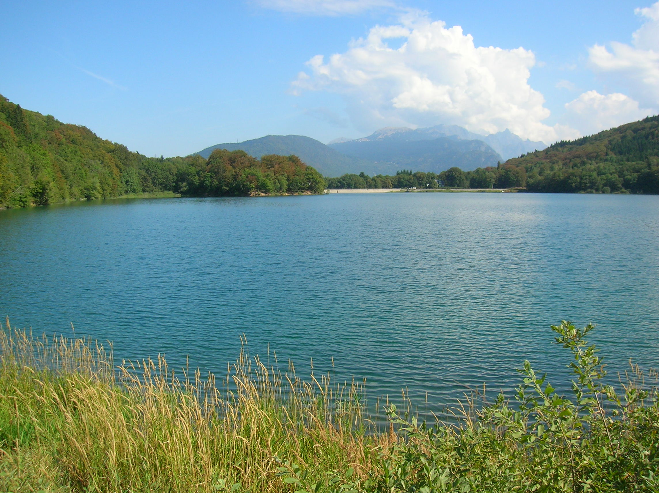 Lac Mort. Laffrey, Isère, AuRA, France.